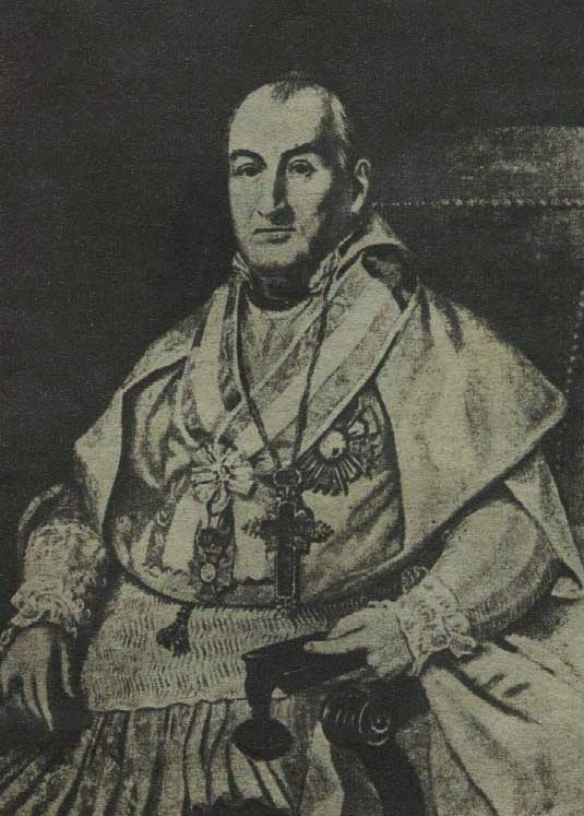 Juan José Diaz de Espada y Fernández de Landa